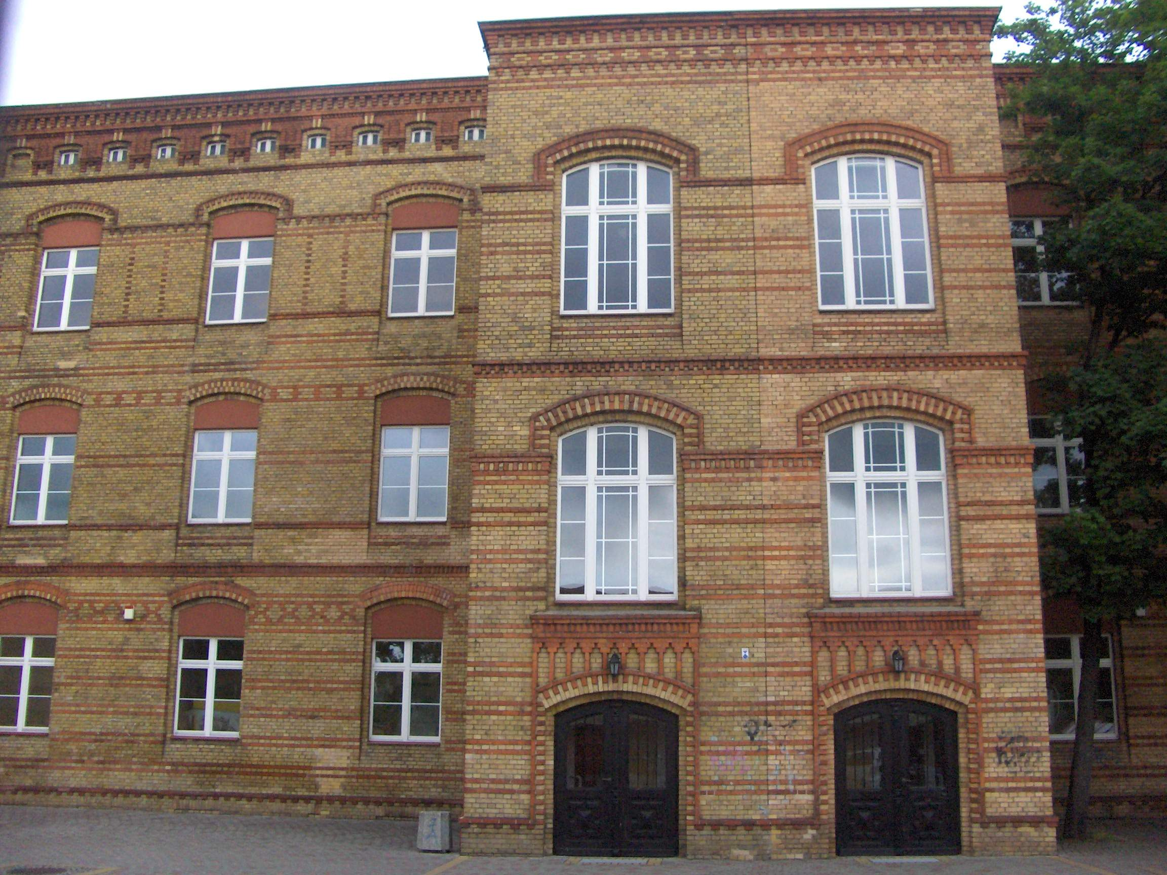 Zabytkowy budynek szkoły przy ul. Wojska Polskiego 1 w Słubicach #2